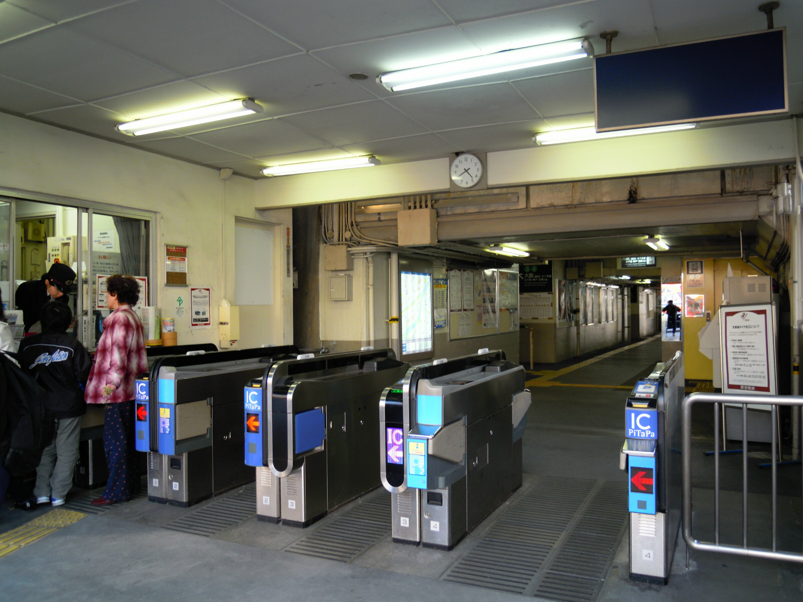 Hankyu Aikawa station ticket gate